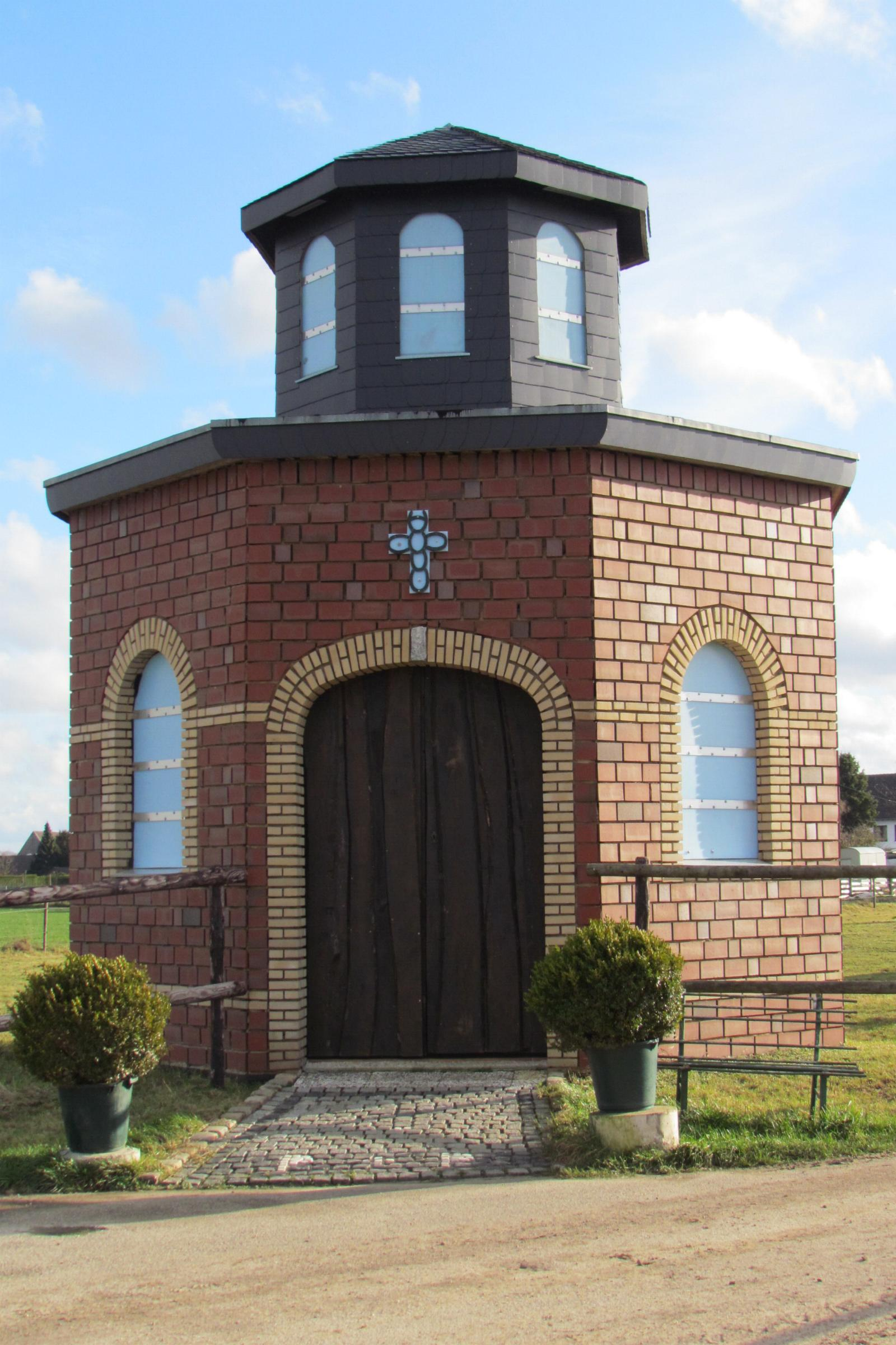 Kirchen und Kapellen in der Stadt Geilenkirchen